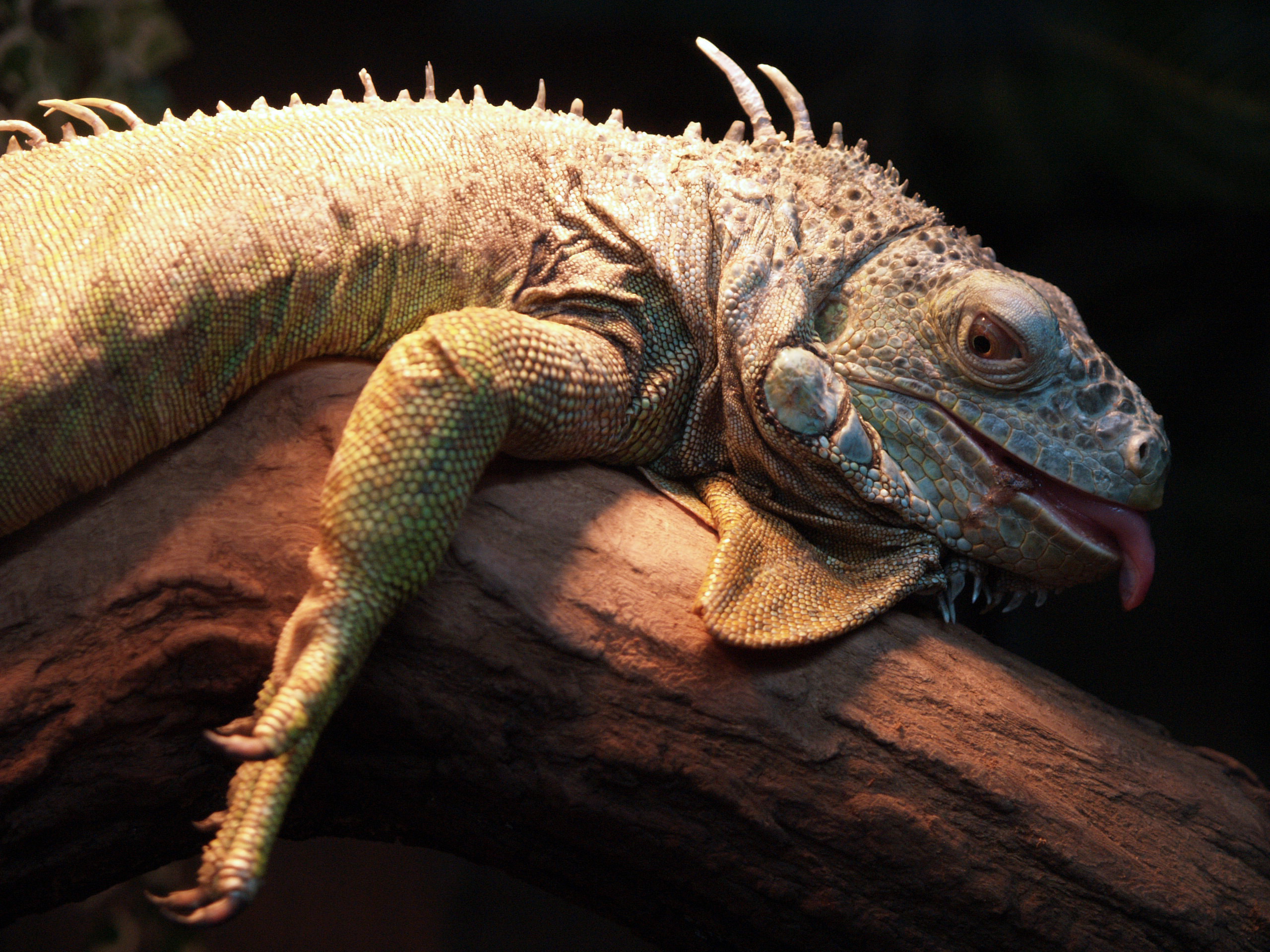 Green Iguana (Iguana iguana)